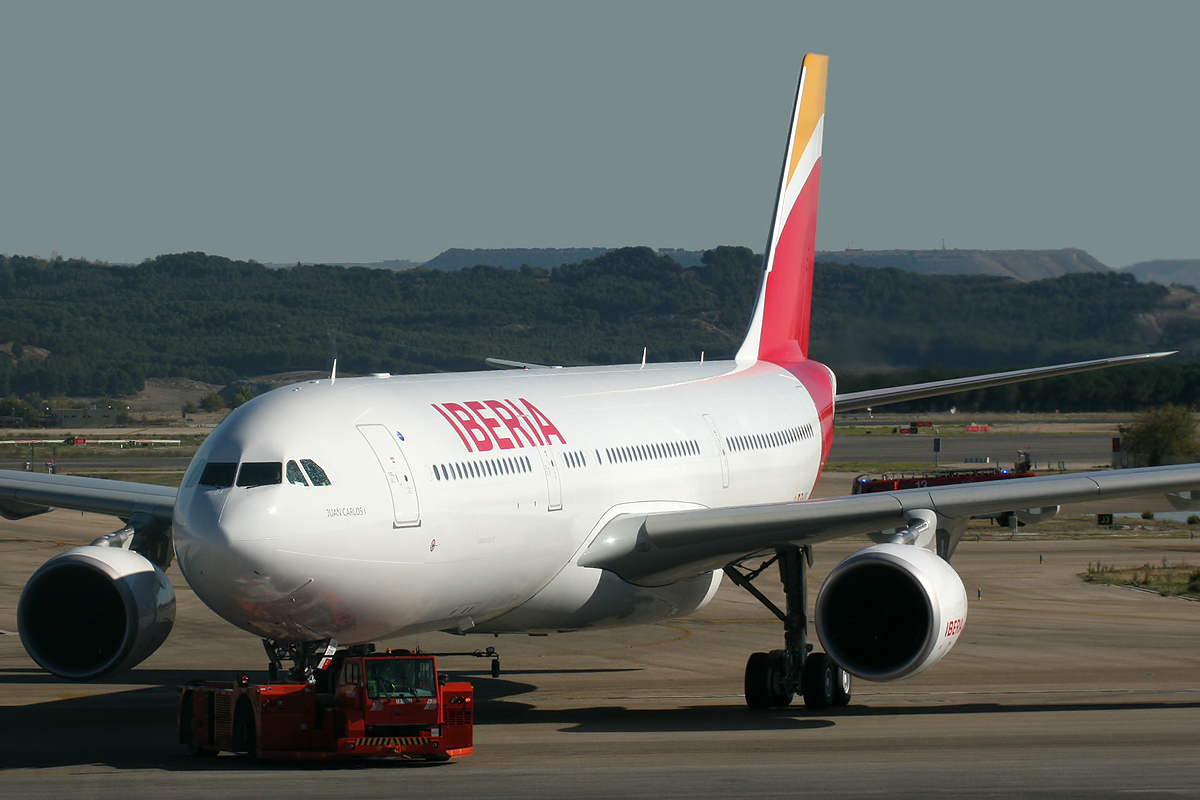 Madrid - Barajas Airport (LEMD/MAD)